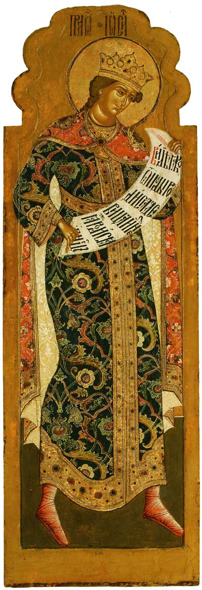 Праотец Иосиф. Праотеческий чин из главного иконостаса ц. Иоанна Златоуста в Коровниках в Ярославле